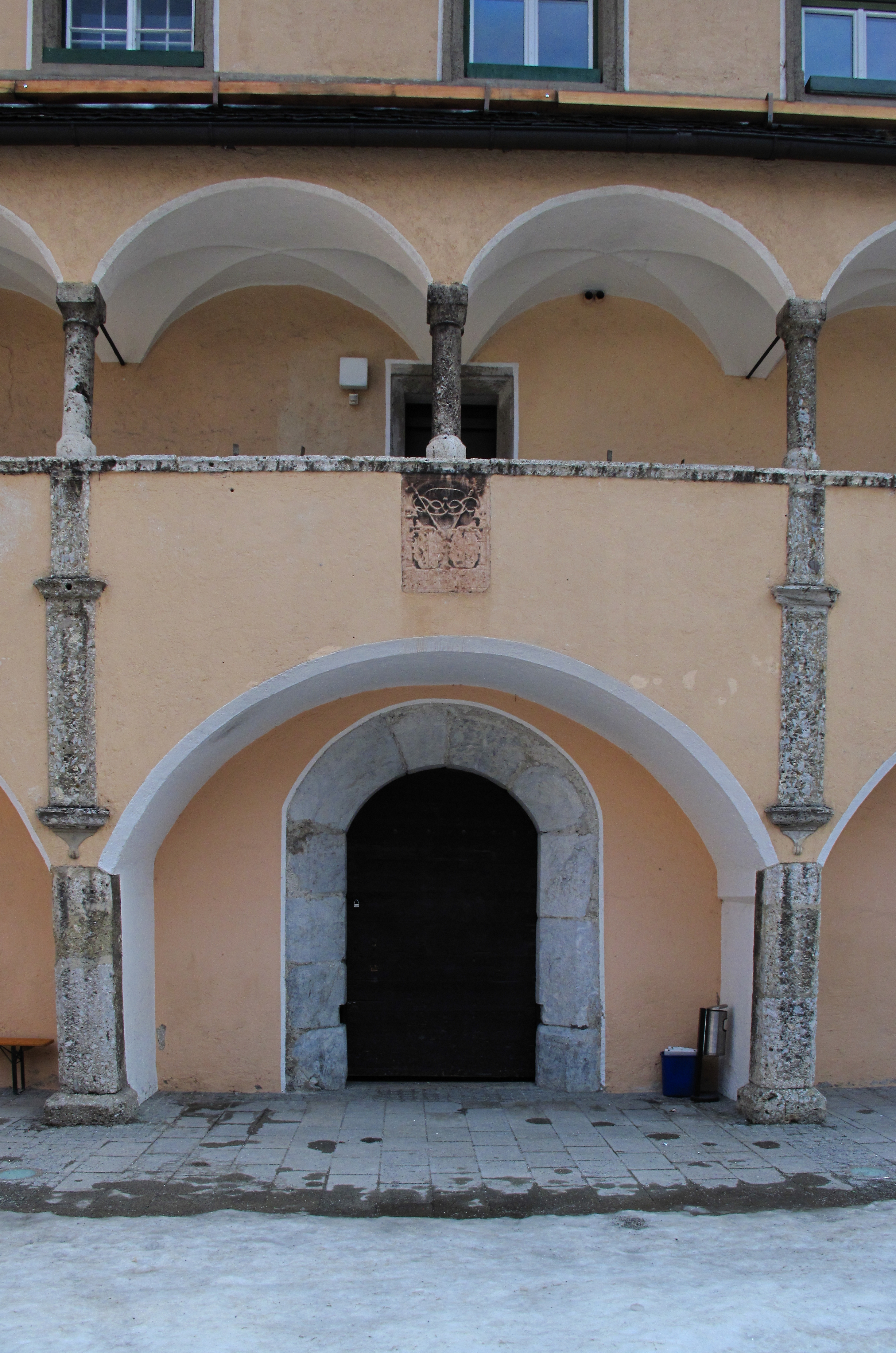 Gemeindeamt, Brennhof, 5450 Werfen, Markt 24